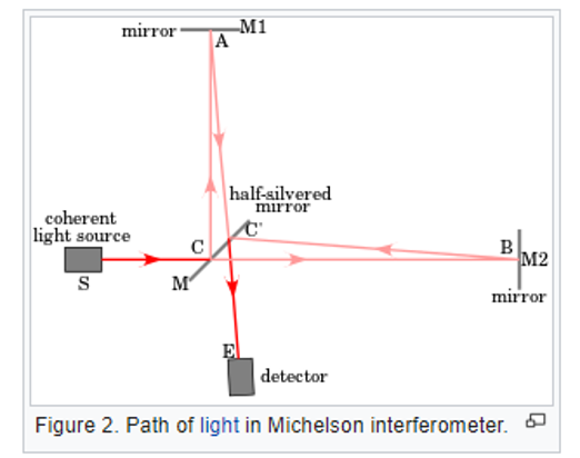 איור 2